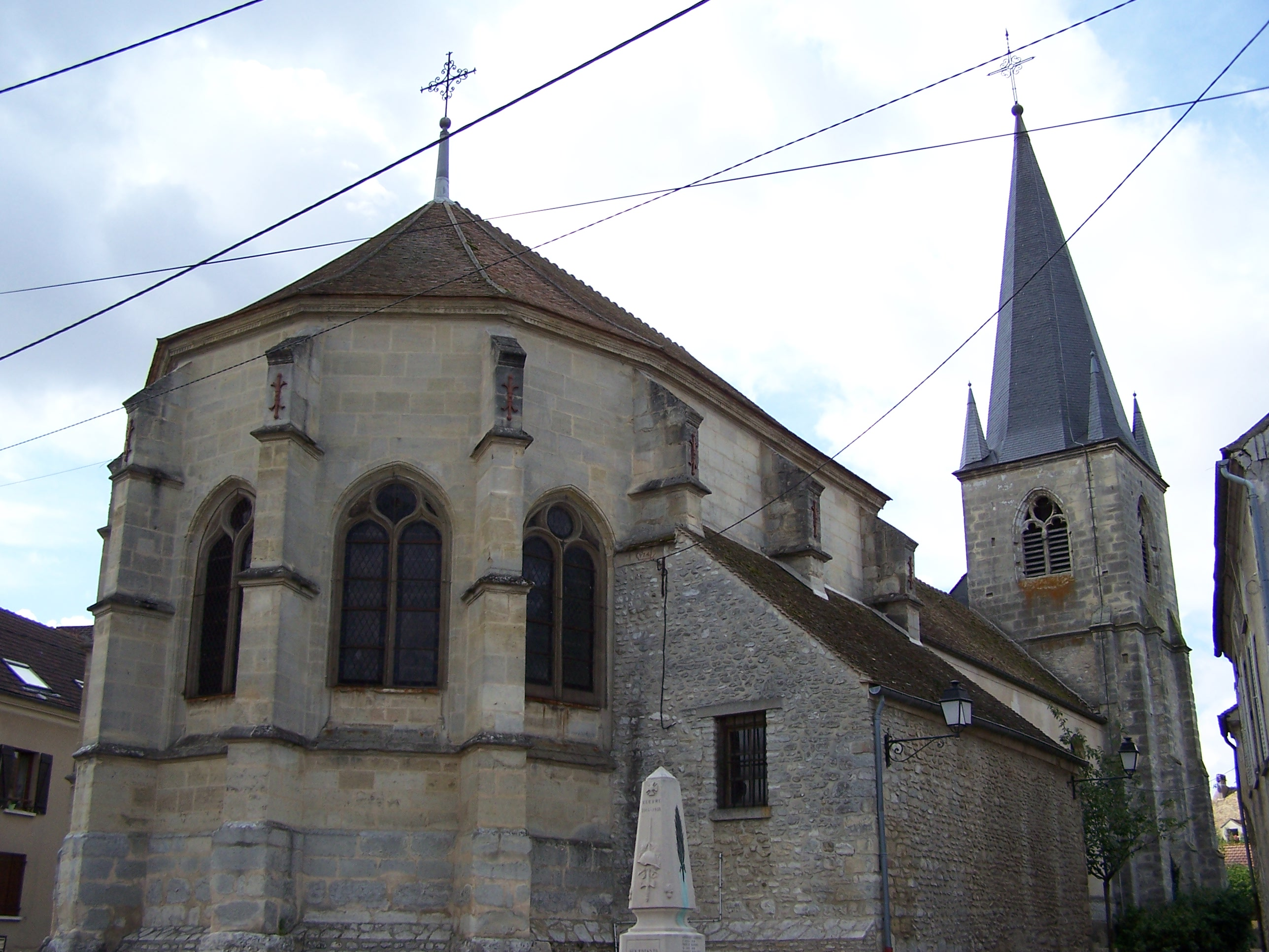 Église de Montainville (Yvelines, France). Photo personnelle. Church of Montainville (Yvelines, France). Personal photo. Auteur/Author : ℍenry Salomé